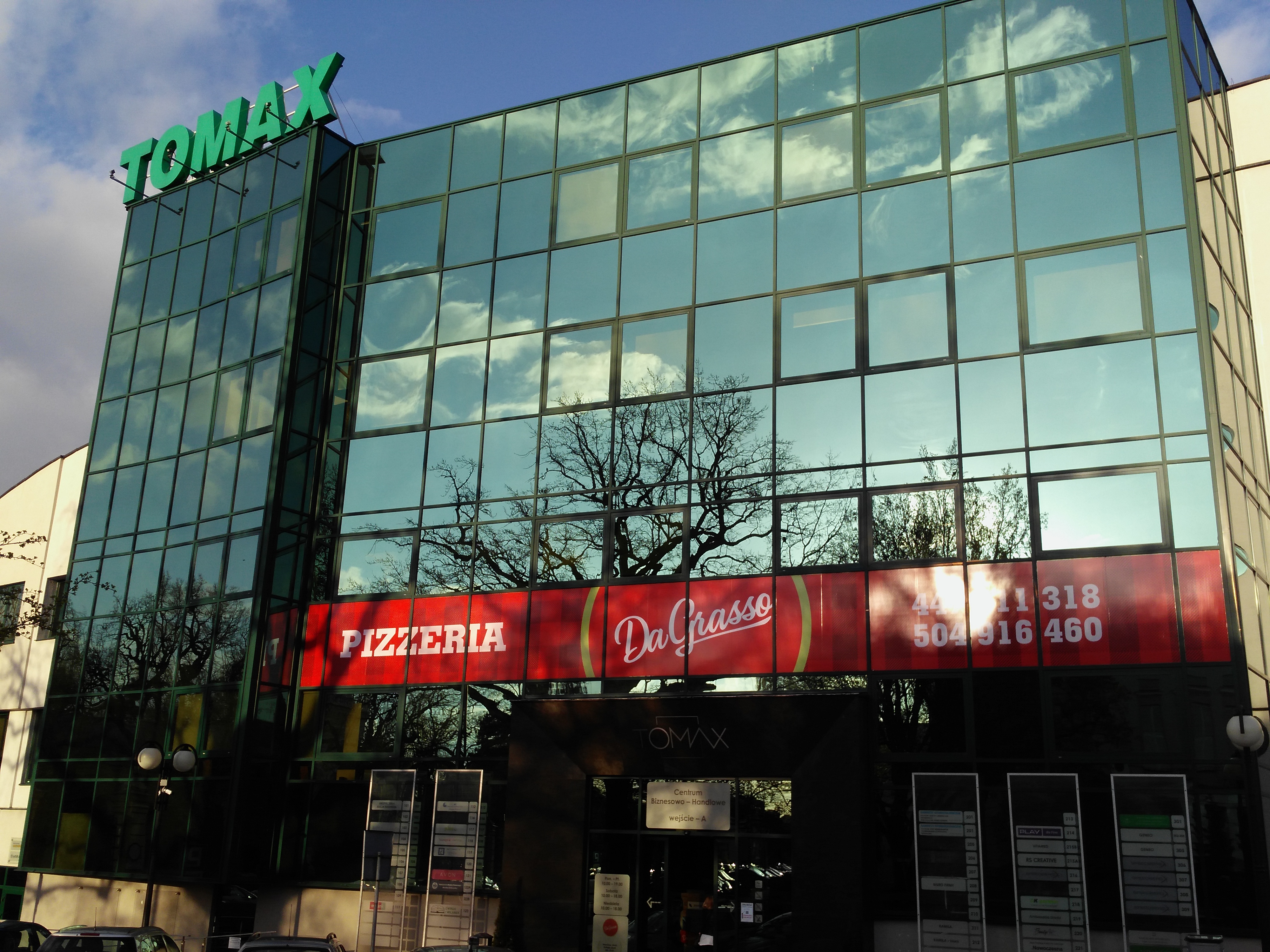 Dom Handlowy Tomax, jeden z otwartych po 1989 roku w Tomaszowie